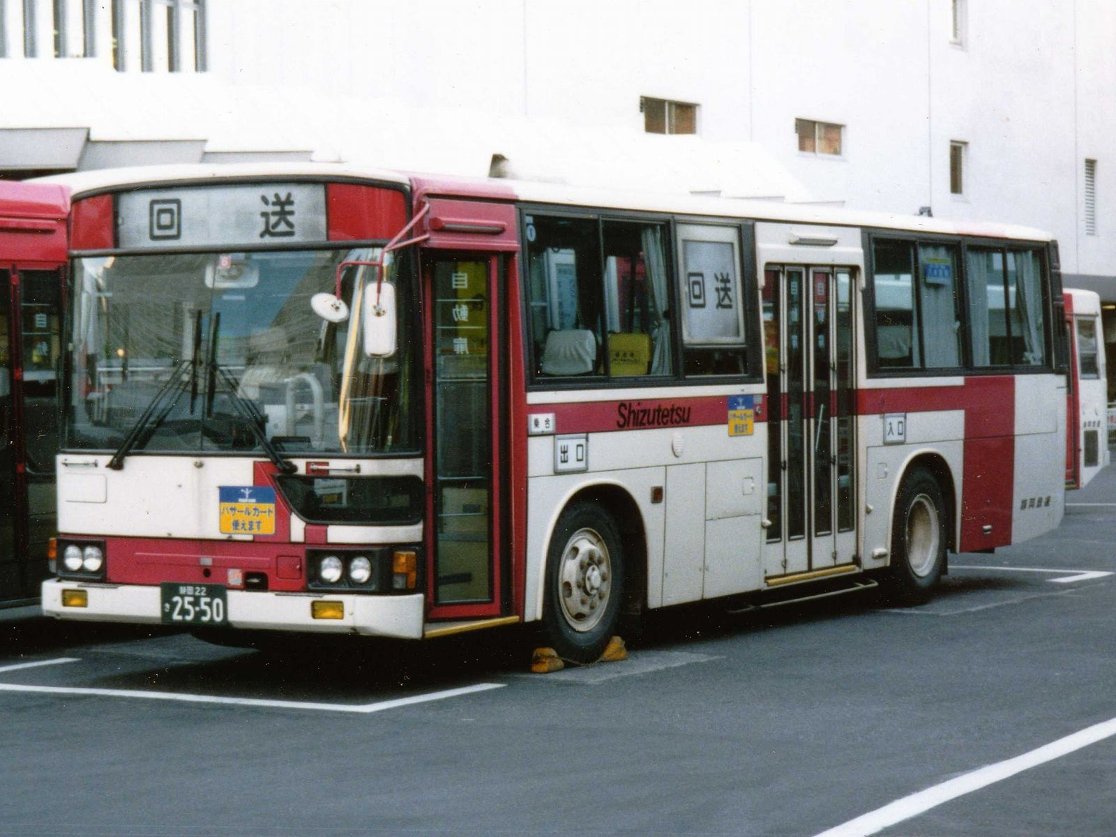 Shizutetsu Mitsubishi P-MP218K at Shinshizuoka